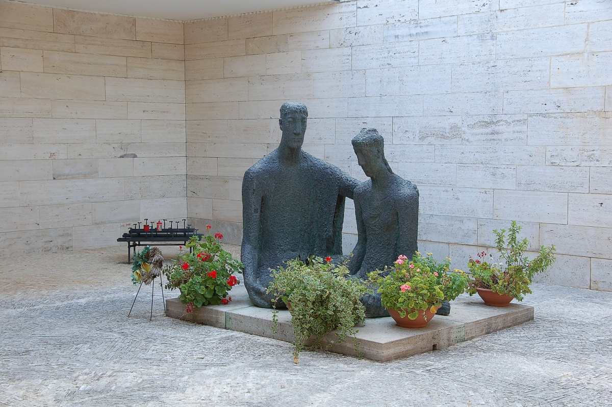 Der deutsche Soldatenfriedhof Cassino